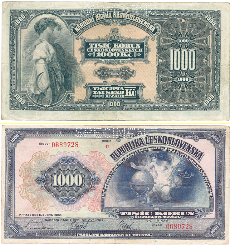 1000 korun Česko-Slovenských z roku 1932